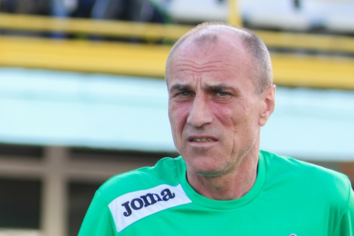 Іван Григорович Шарій — український футболіст, нападник і тренер. Майстер спорту СРСР